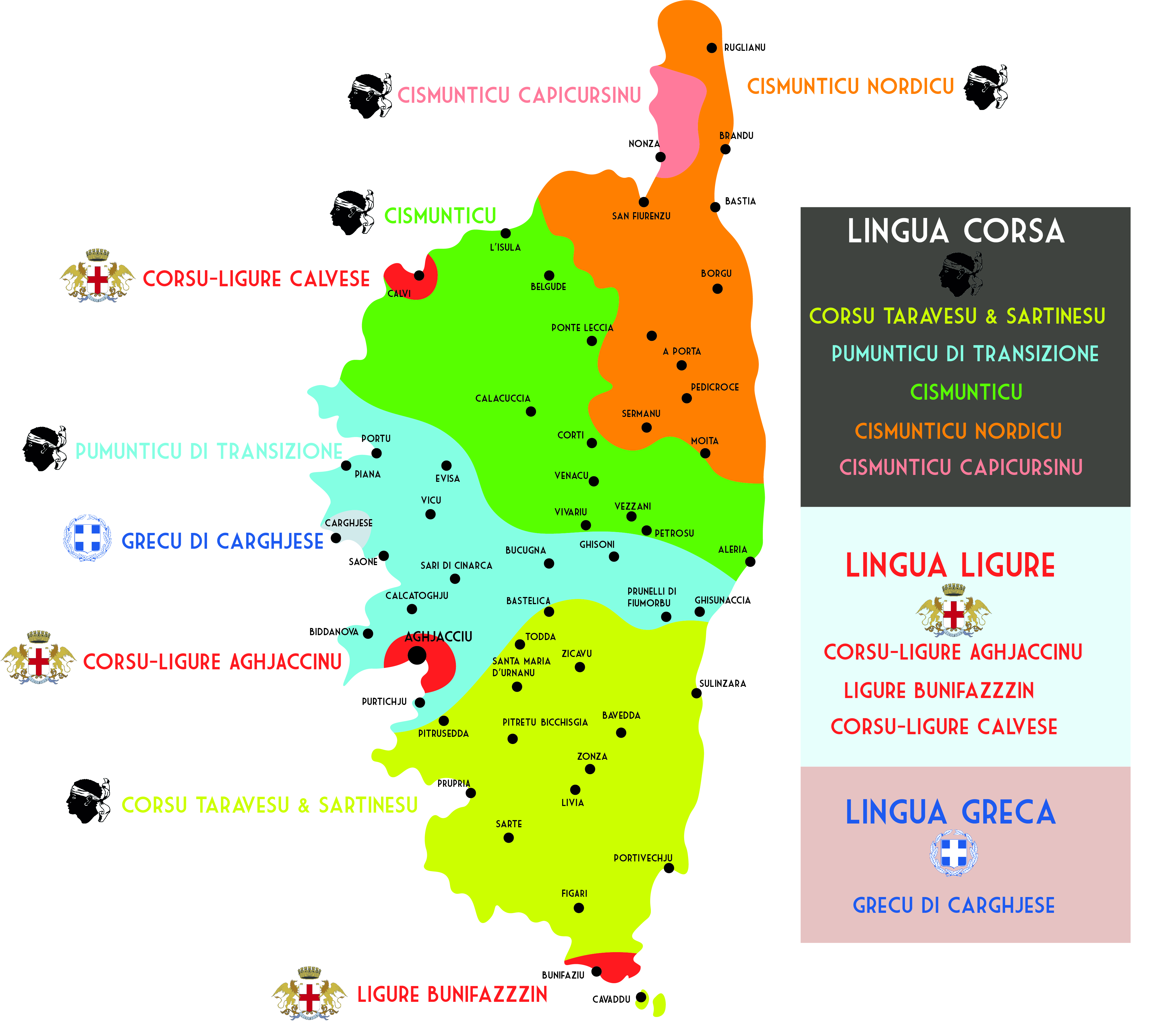 Parlers de Corse